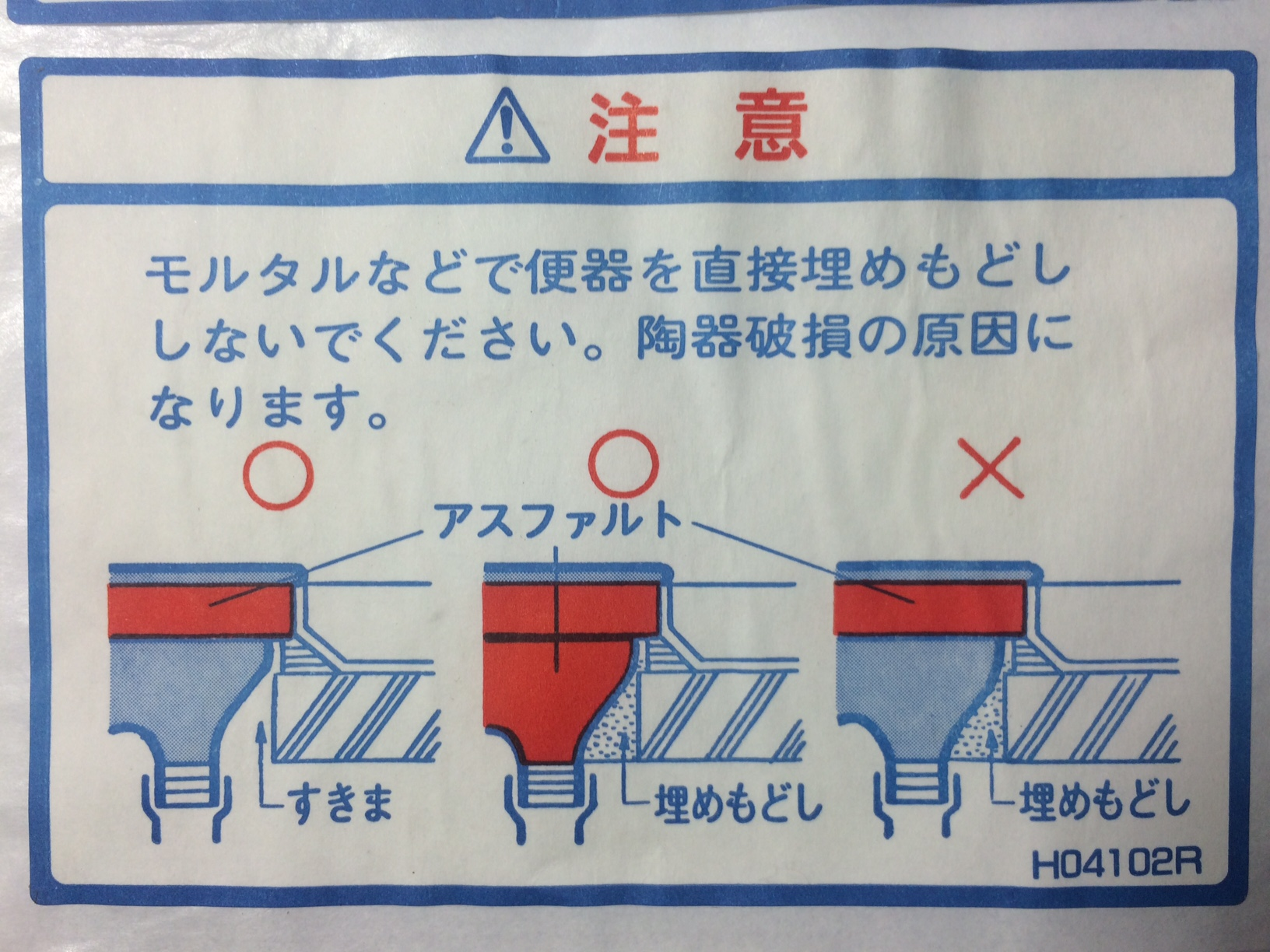 注意喚起シール